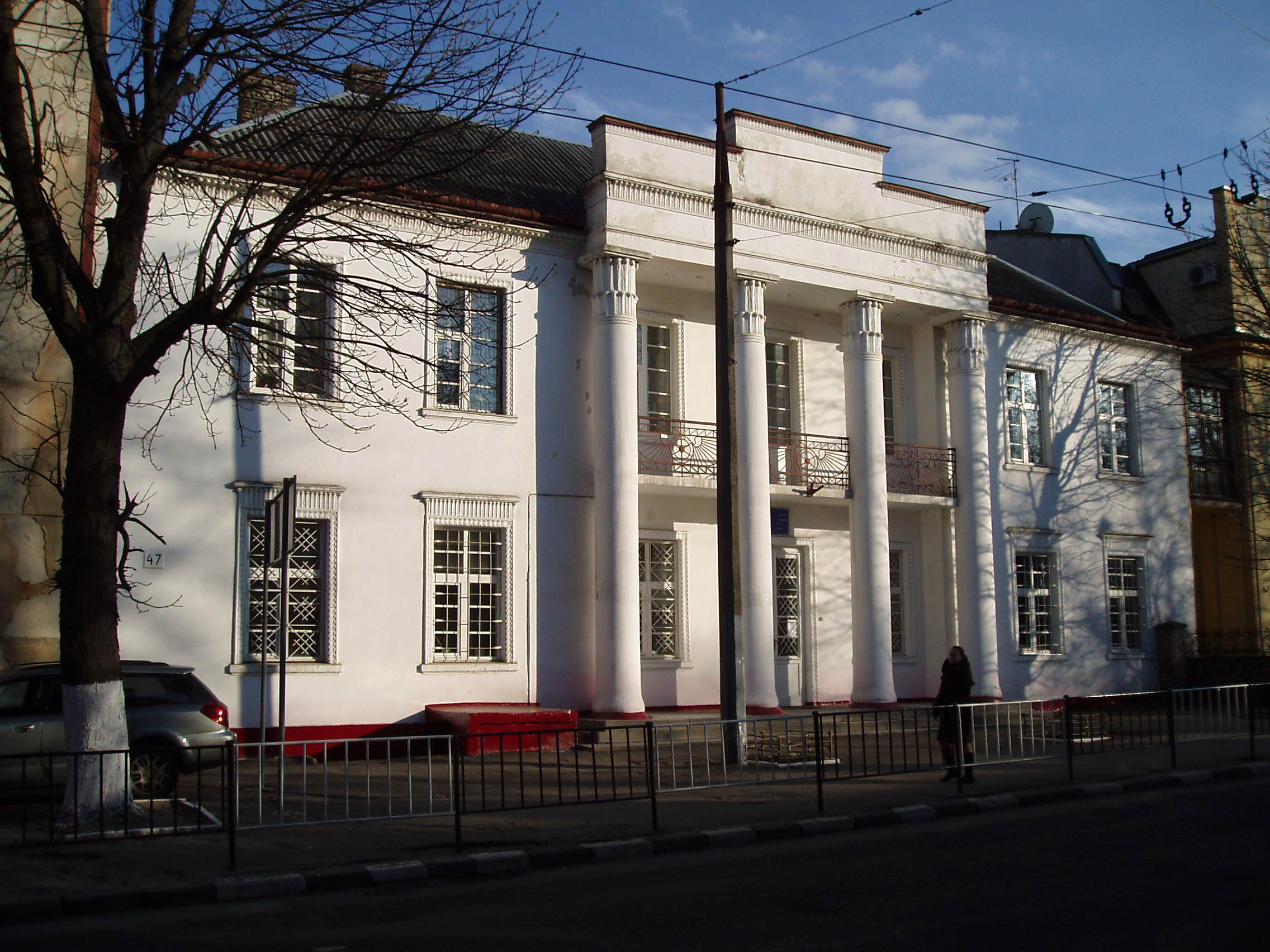 Будинок № 47 на вулиці Антоновича у Львові.